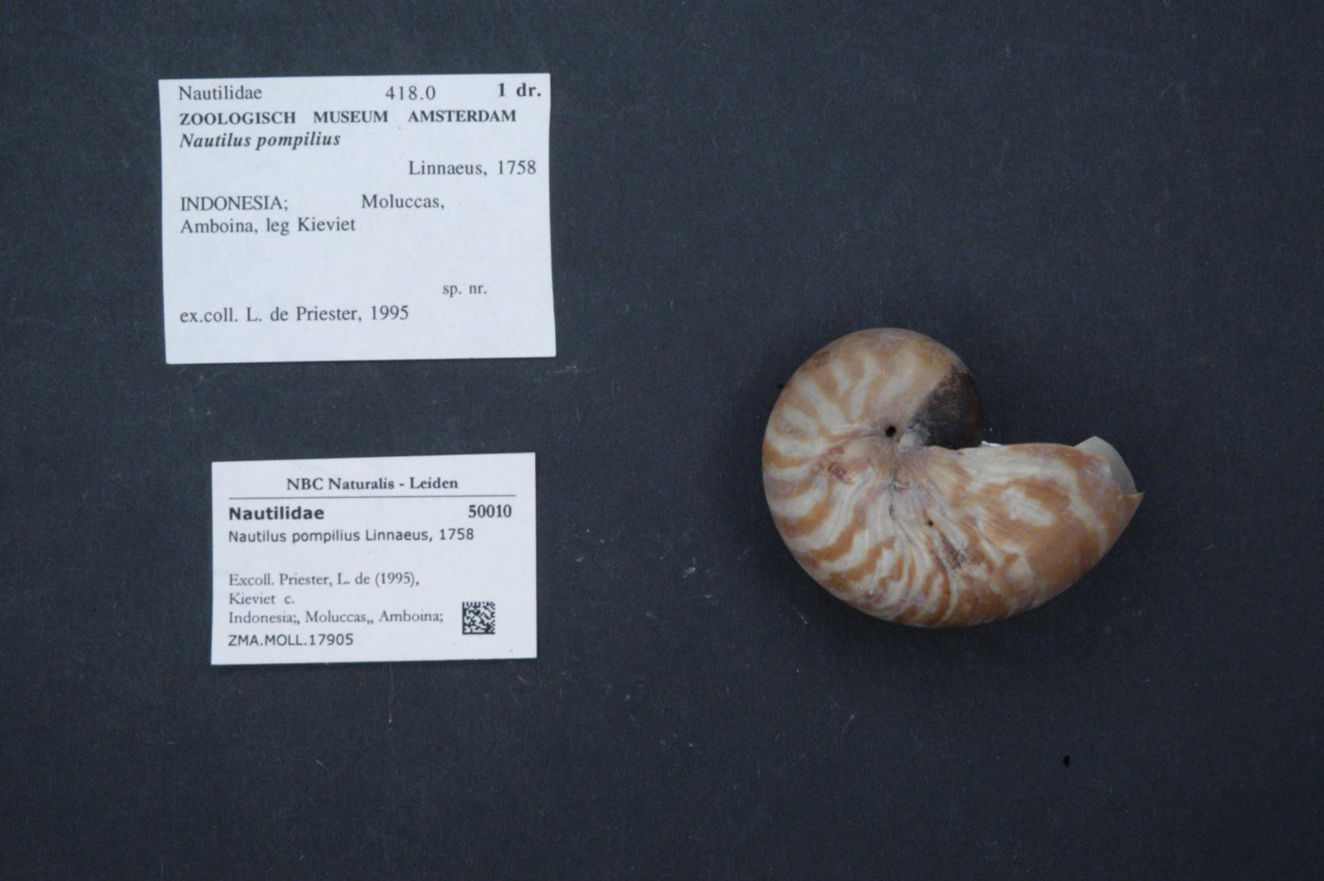 Nautilus pompilius Linnaeus, 1758